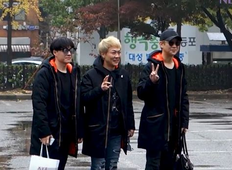 171103 엔알지(NRG) 뮤직뱅크 리허설 출근길 풍경 입니다.